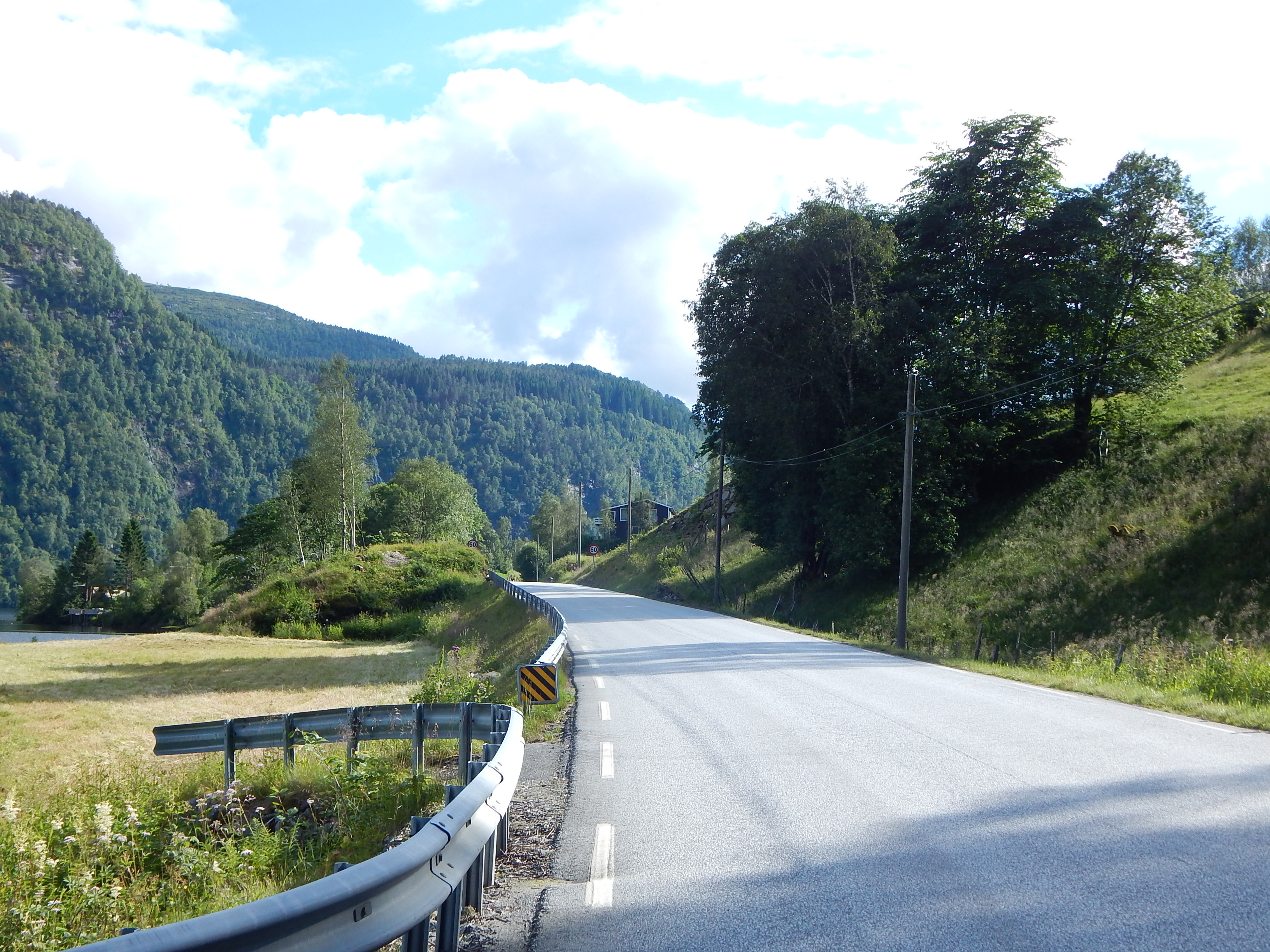 E39 ved Movatnet i Førde kommune